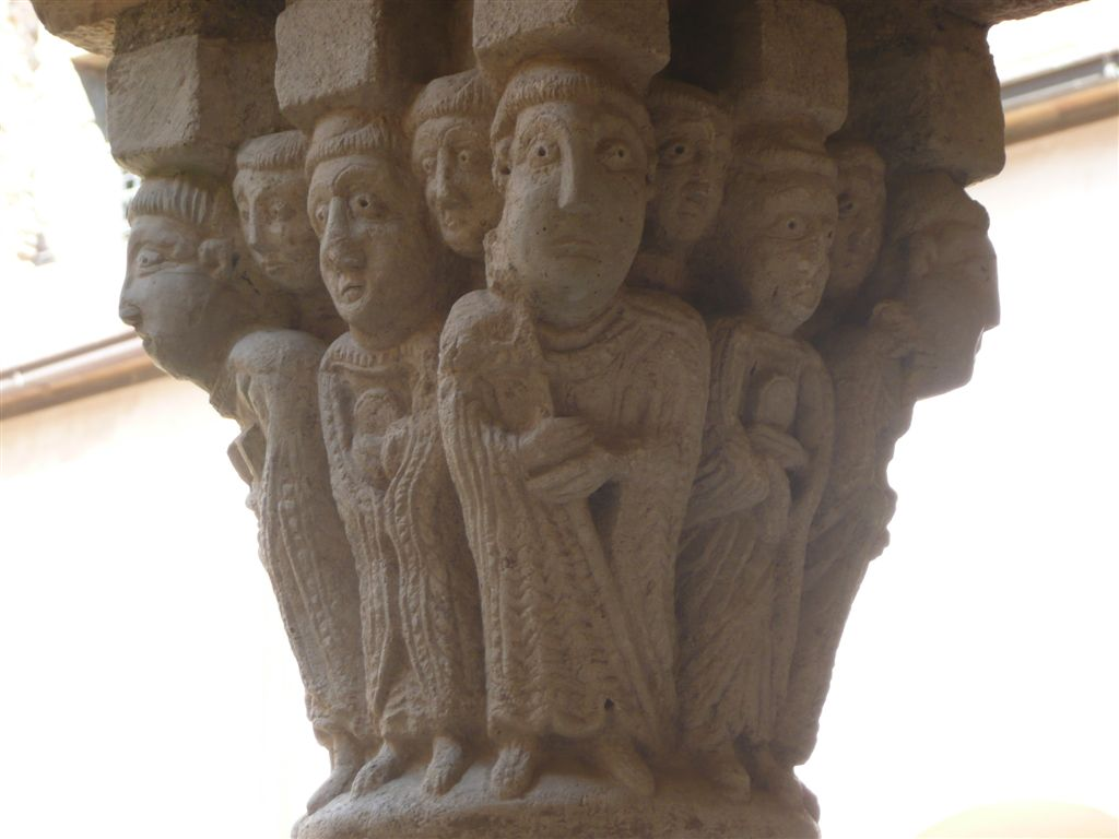 Monestir de Sant Pere de Rodes (el Port de la Selva, Alt Empordà, Catalunya). Capitell dels monjos, al claustre superior.